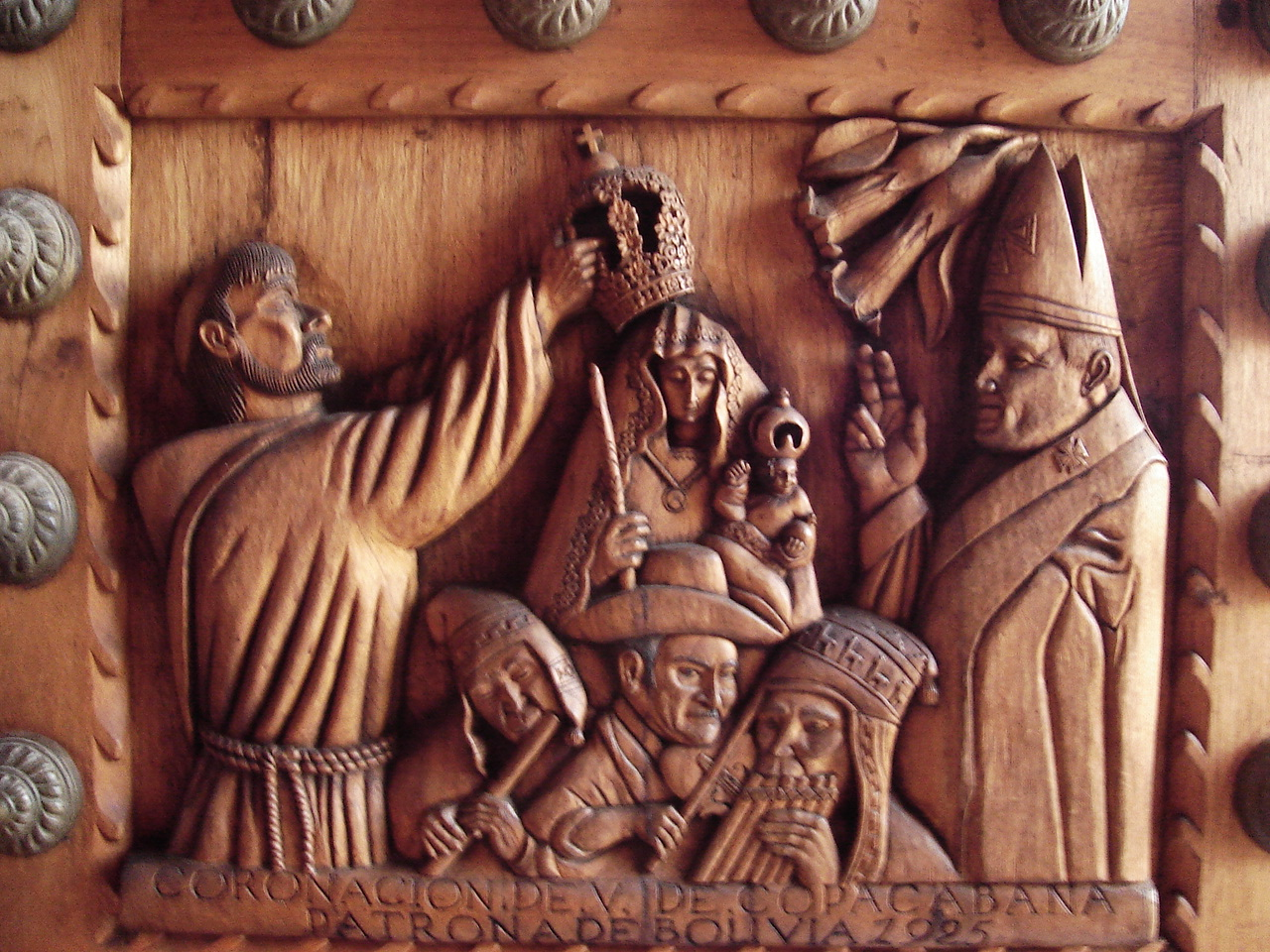 Porta da igreja Nossa Senhora de Copacabana. Foto tirada por mim, em Copacabana.